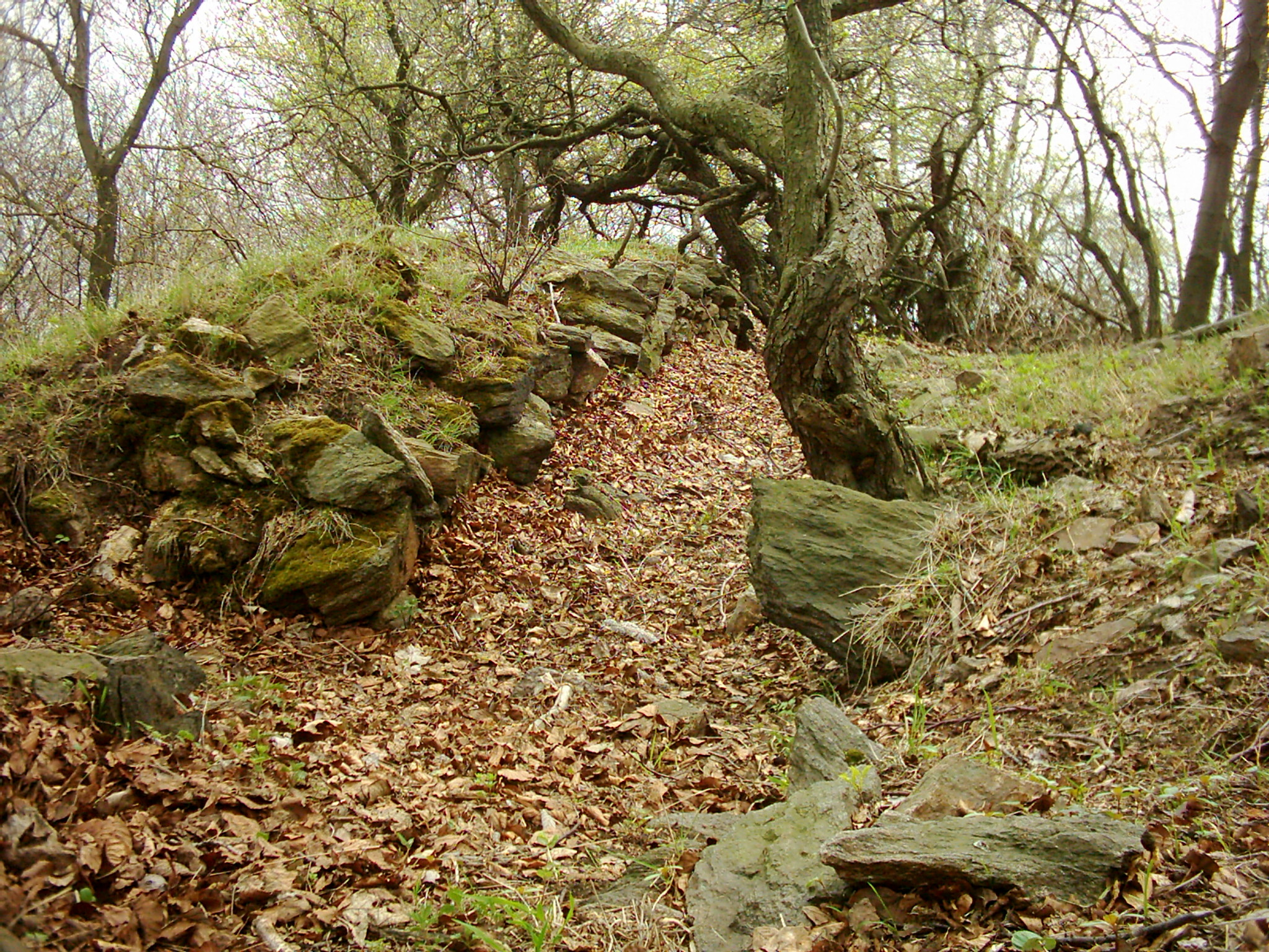 Starý Žeberk - hradba prvního nádvoří